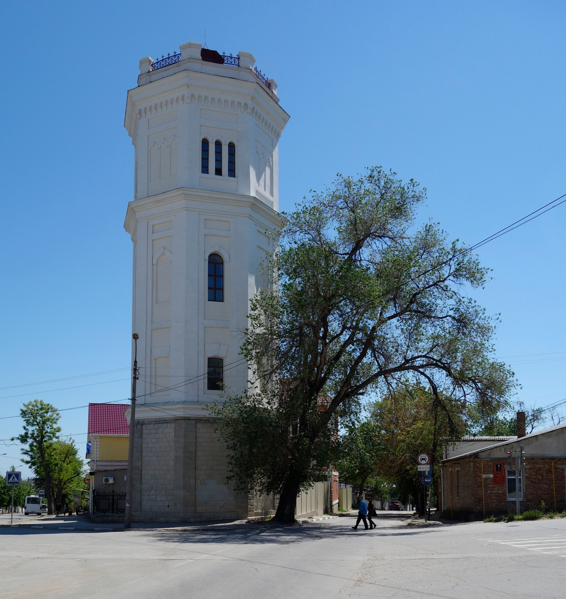 Водонапорная башня «Белый бассейн»: улица Русская, 77а, литер "А" (бывш. улица Свердлова, 77а)", Феодосия, Крым This object is located on the Crimean Peninsula and recognized as cultural heritage by both Russia and Ukraine under the monument ID: 8231436000/ 01-116-0105, respectively. The legal status of the Crimean region is currently disputed.